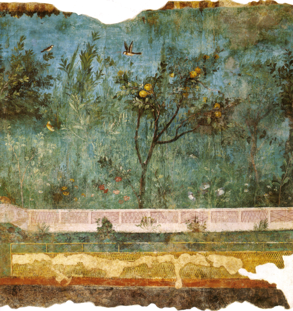 Villa di livia, affreschi di giardino, parete corta meridionale 02